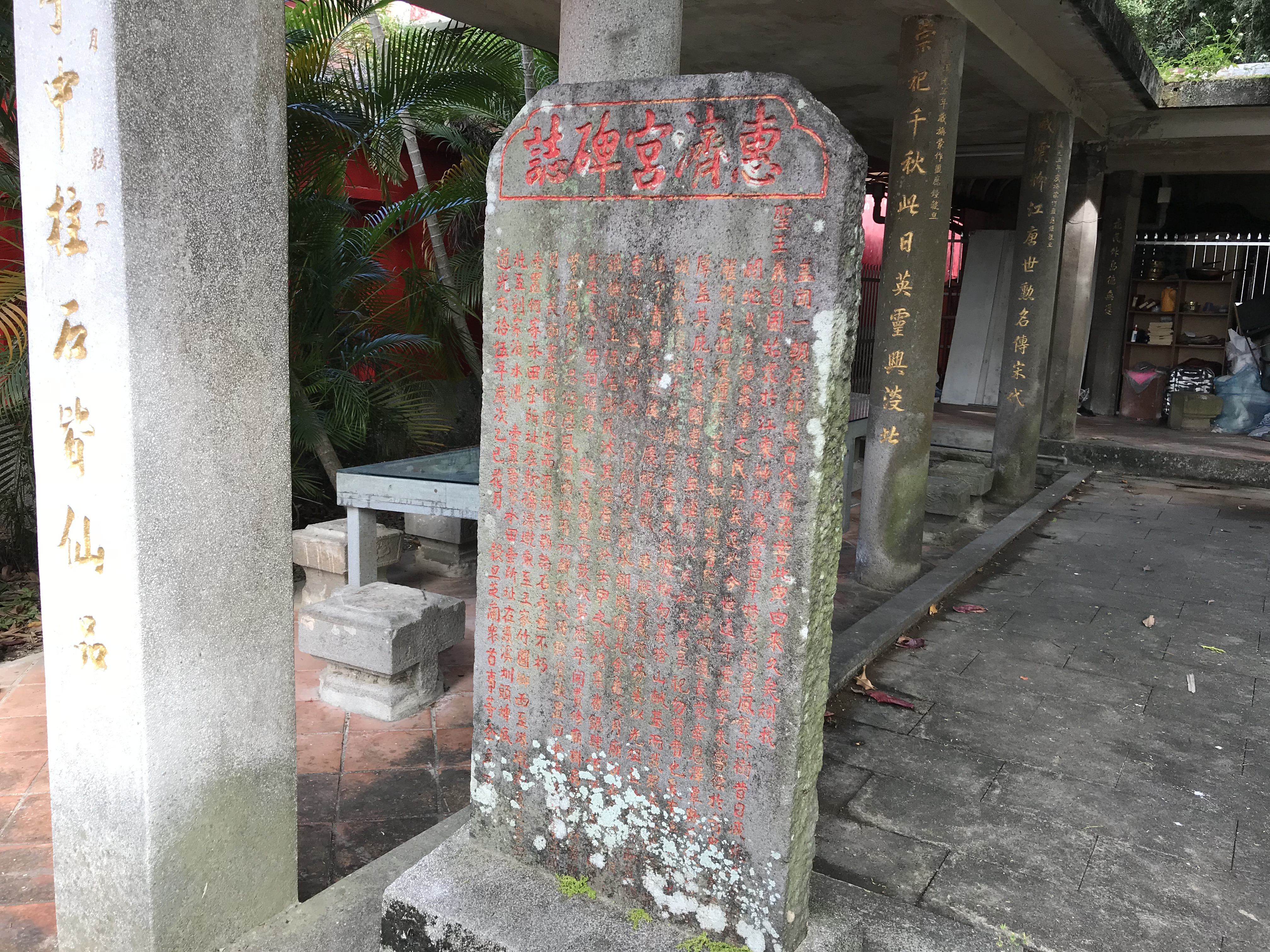 中文（台灣）: 惠濟宮碑誌